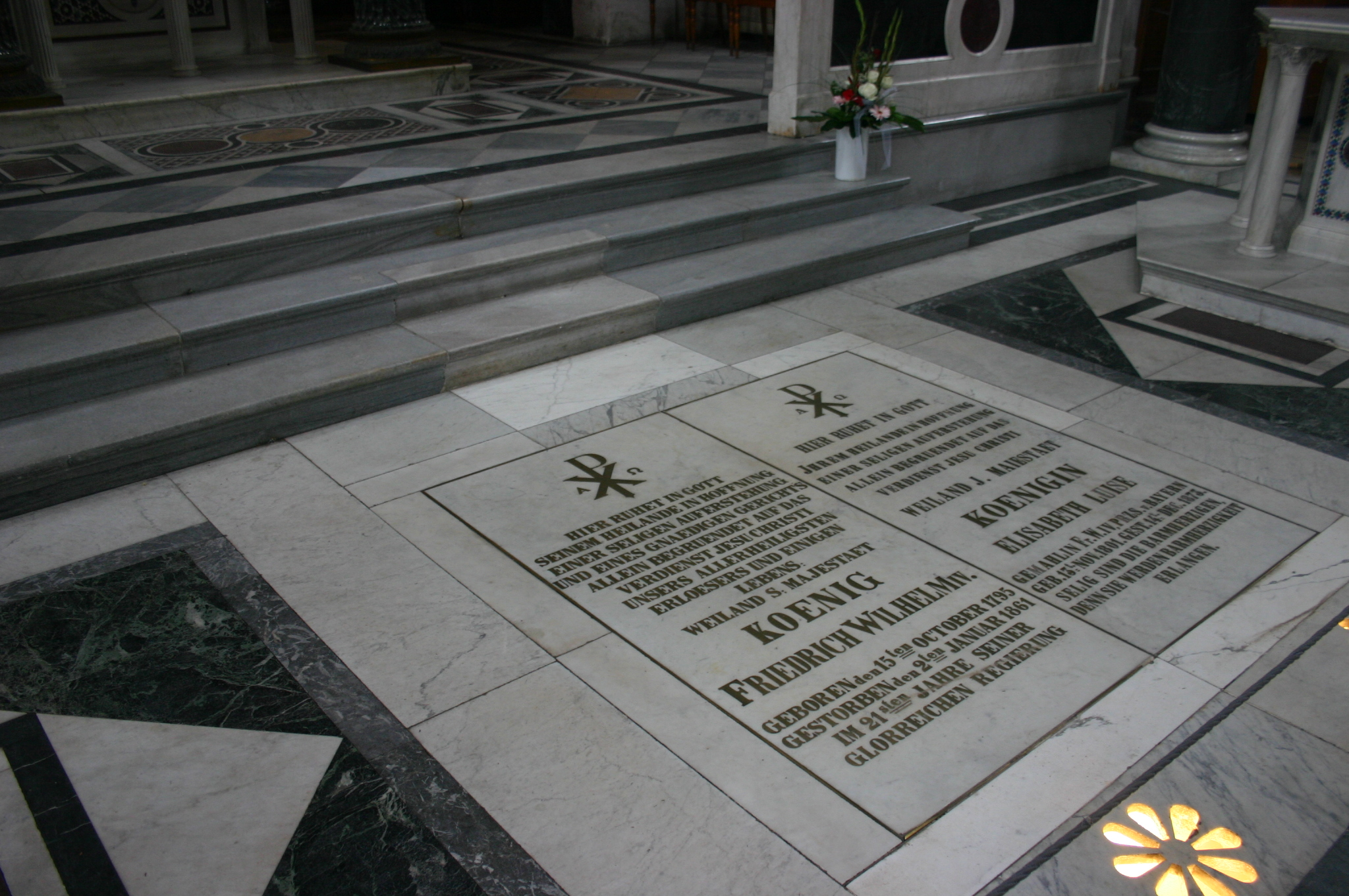 königliche Gruft Friedrich Wilhelm IV in der Friedenskirche Potsdam